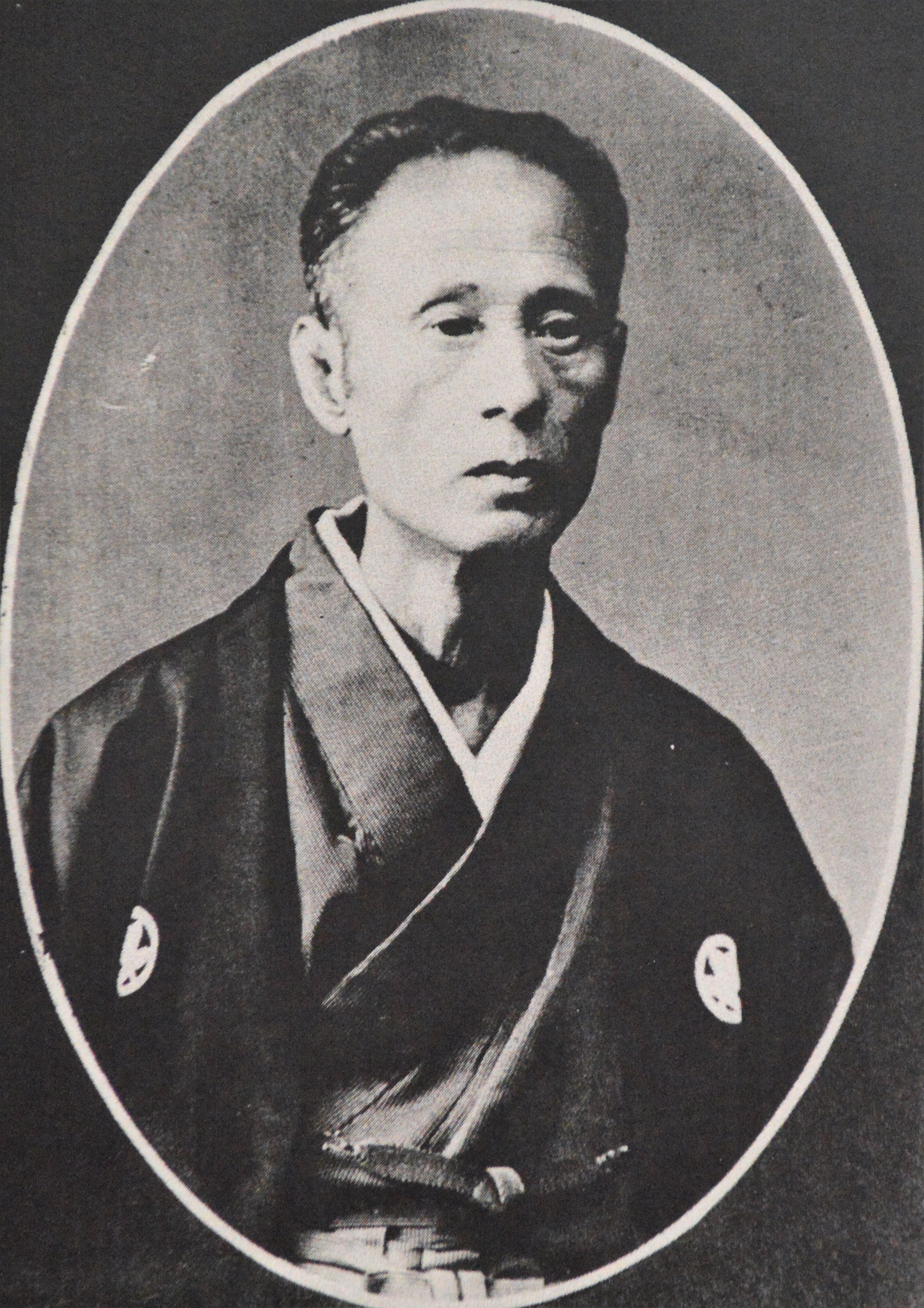 片岡毛織の創業者の一人である片岡孫三郎。